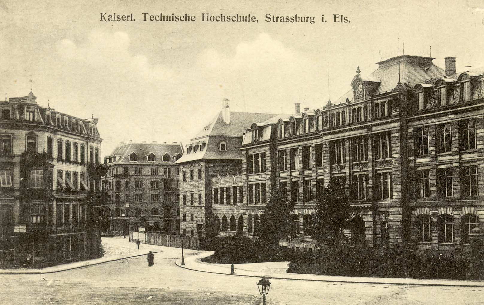 Carte postale des bâtiments de l'école technique impériale (actuellement INSA de Strasbourg) vers 1910, les bâtiments sont aujourd'hui occupés par le lycée technique commercial René Cassin